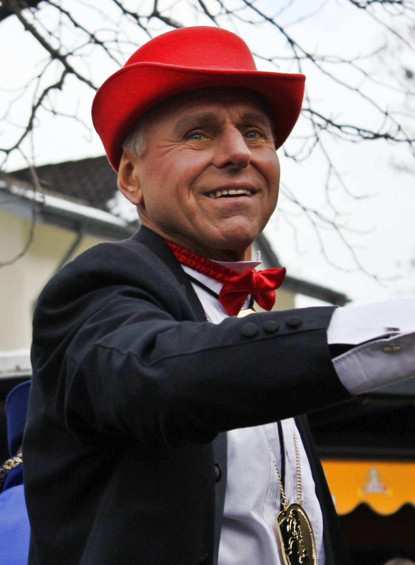 Ex-Fussballer Timo Konietzka als Bartlivater an der Brunner Fasnacht 2012